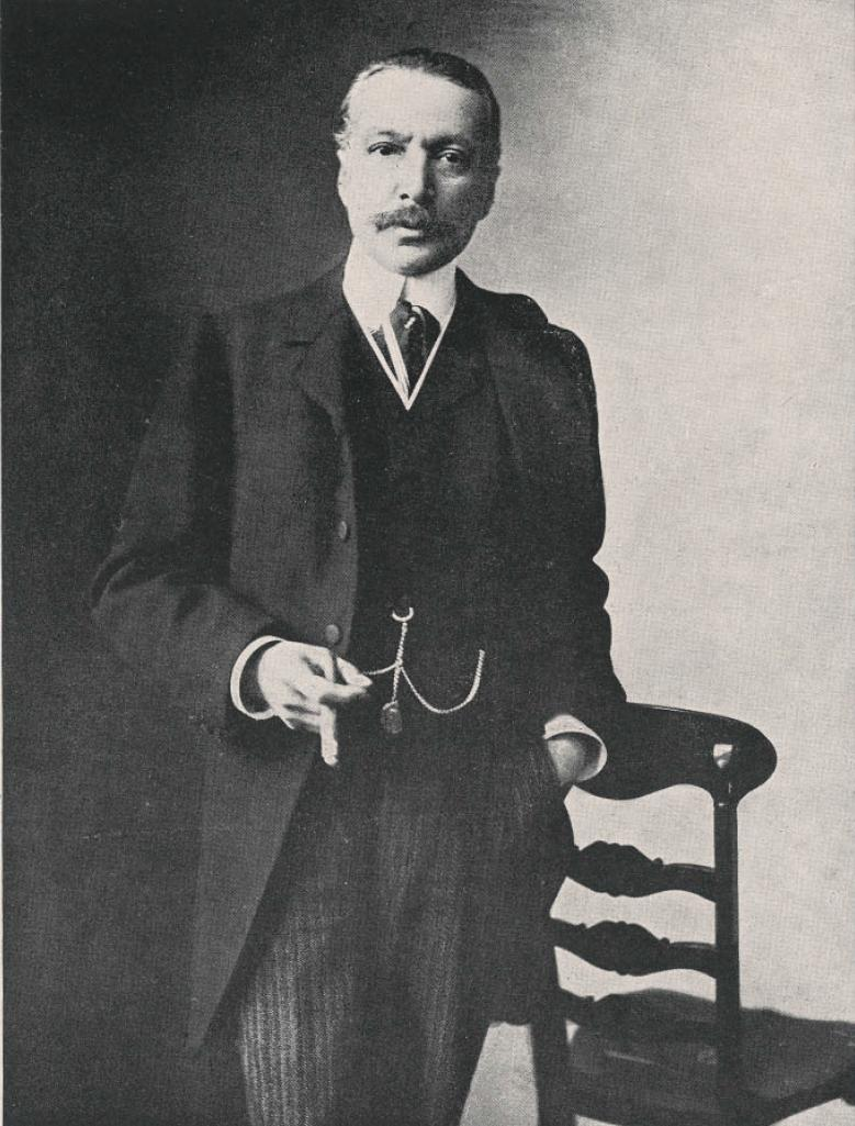 Daniel Riquelme Venegas (Santiago, 1855-Lausana, 9 de agosto de 1912) fue un escritor, periodista y cronista chileno.